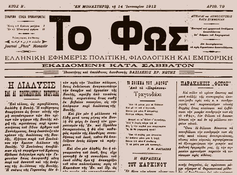 Главата на вестник "Фос".